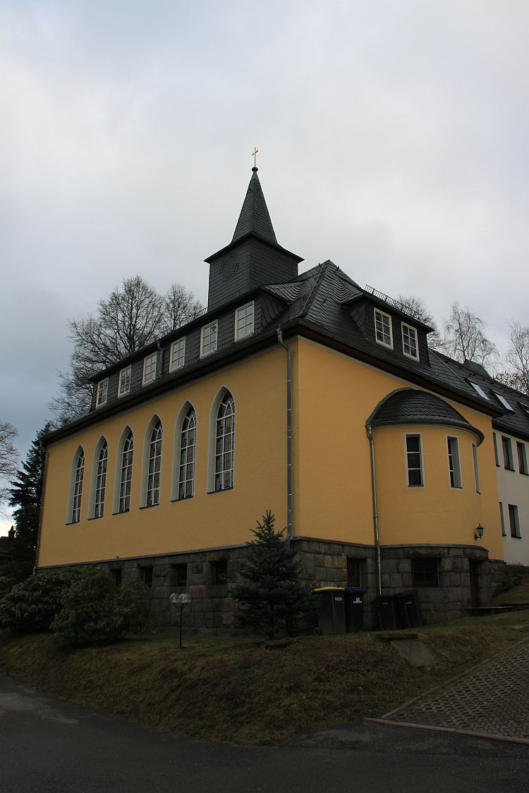 Kirche in Affalter